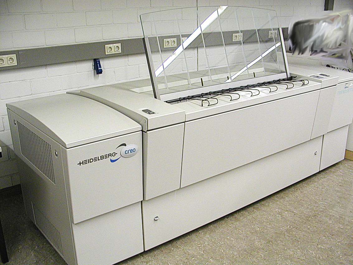 "Trentsetter" der Belichter der Firma Creo und der Heidelberger Druckmaschinen AG (bis 2001, dann Creo Sitex)